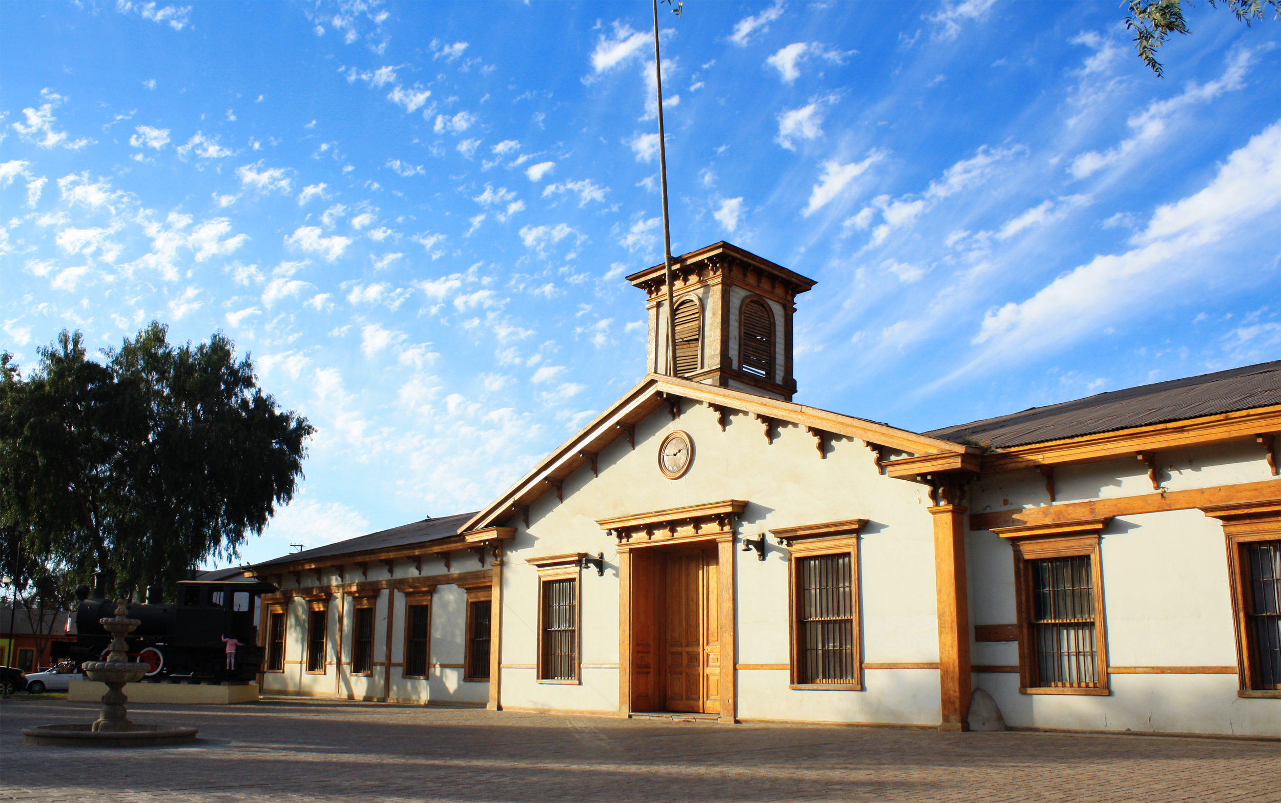 La Estación Copiapó es una ex-estación de ferrocarriles ubicada en la ciudad chilena de Copiapó. Su estructura está compuesta principalmente de madera con tabiquería de cañas y barro y su estilo es una mezcla del neoclasicismo con el estilo colonial americano.En la actualidad sólo recibe transportes de carga administrados por Ferronor. This is a photo of a national monument in Chile: 560